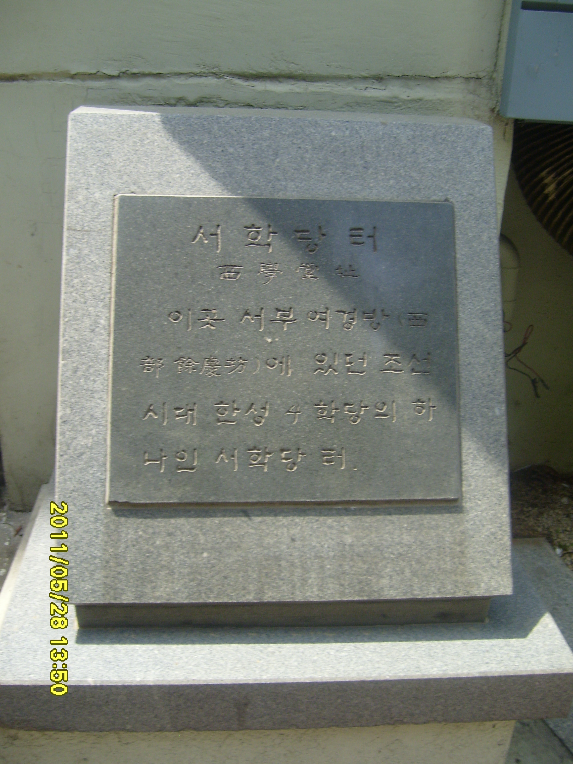 위키백과,정동을 찍다.